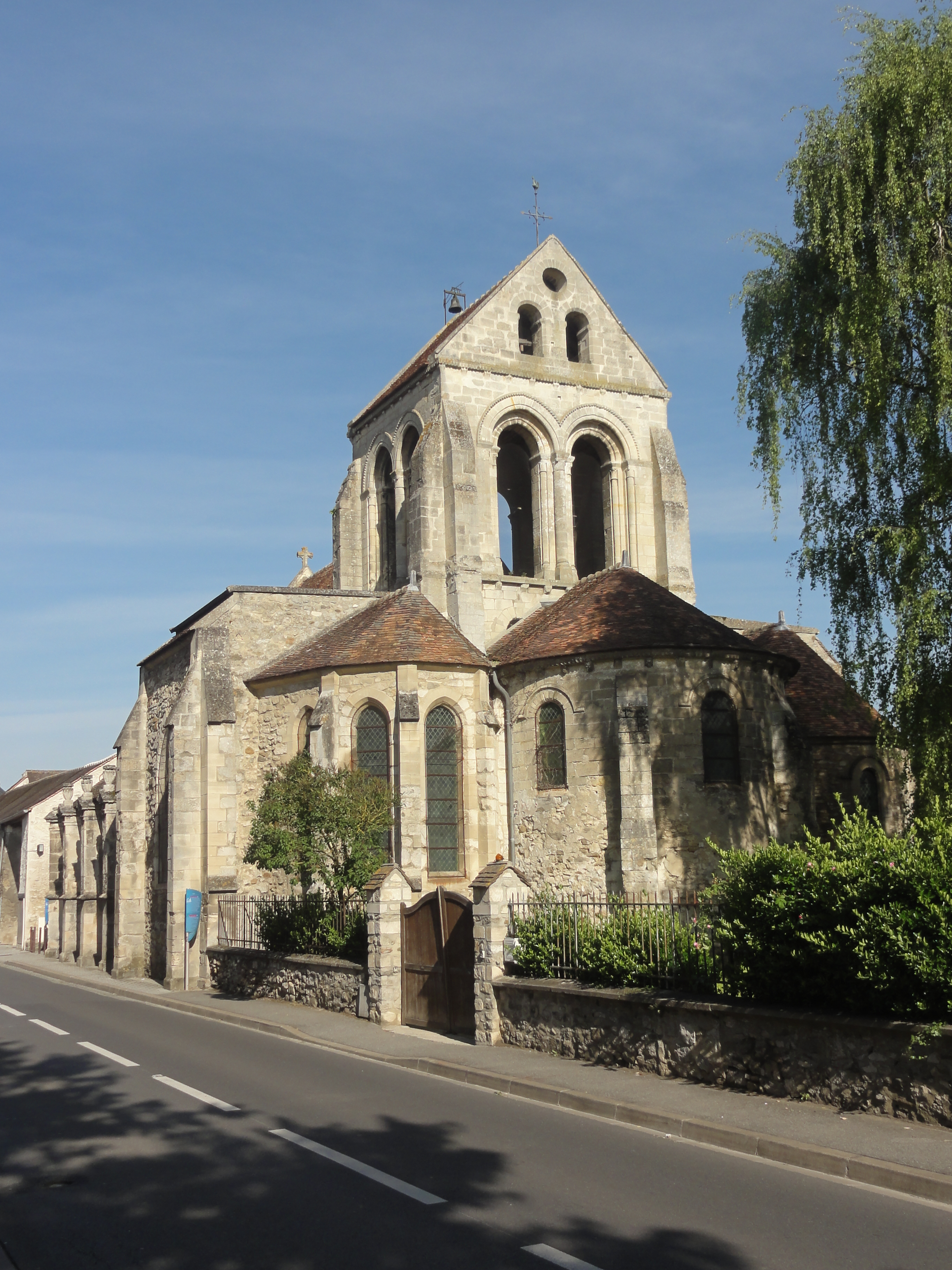 Chevet.